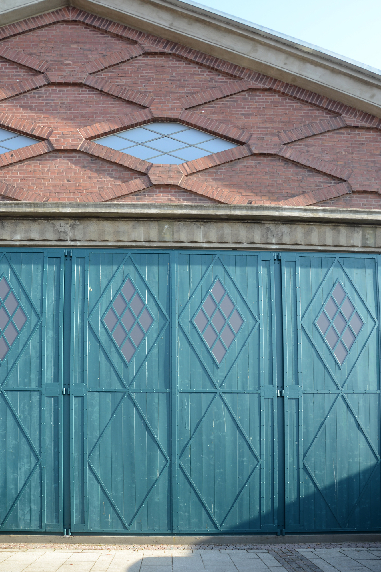 Denkmalgeschützte Gebäude in Darmstadt-Arheilgen, Frankfurter Landstraße 147 Details